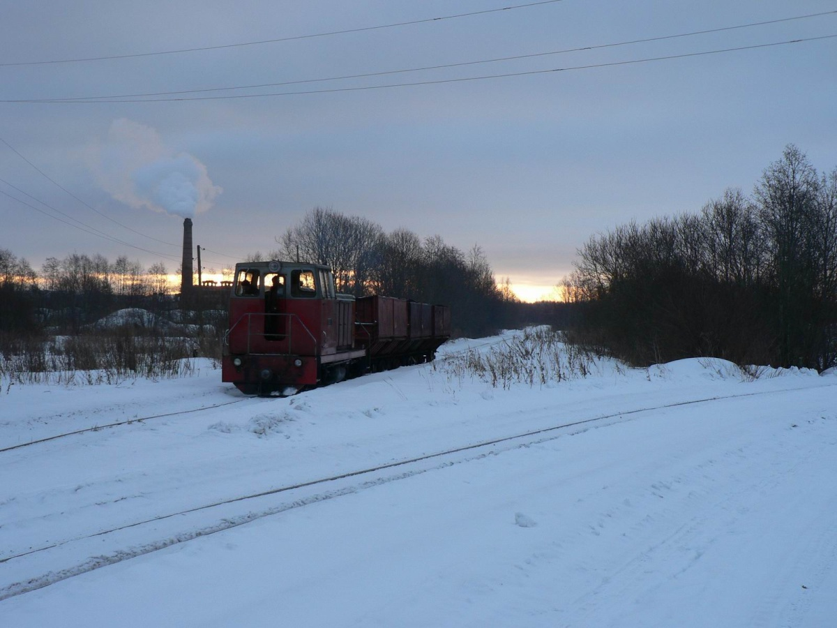 ТУ7А-3333 следует с порожними вагонами от котельной, УЖД Мокеиха-Зыбинского т/пр